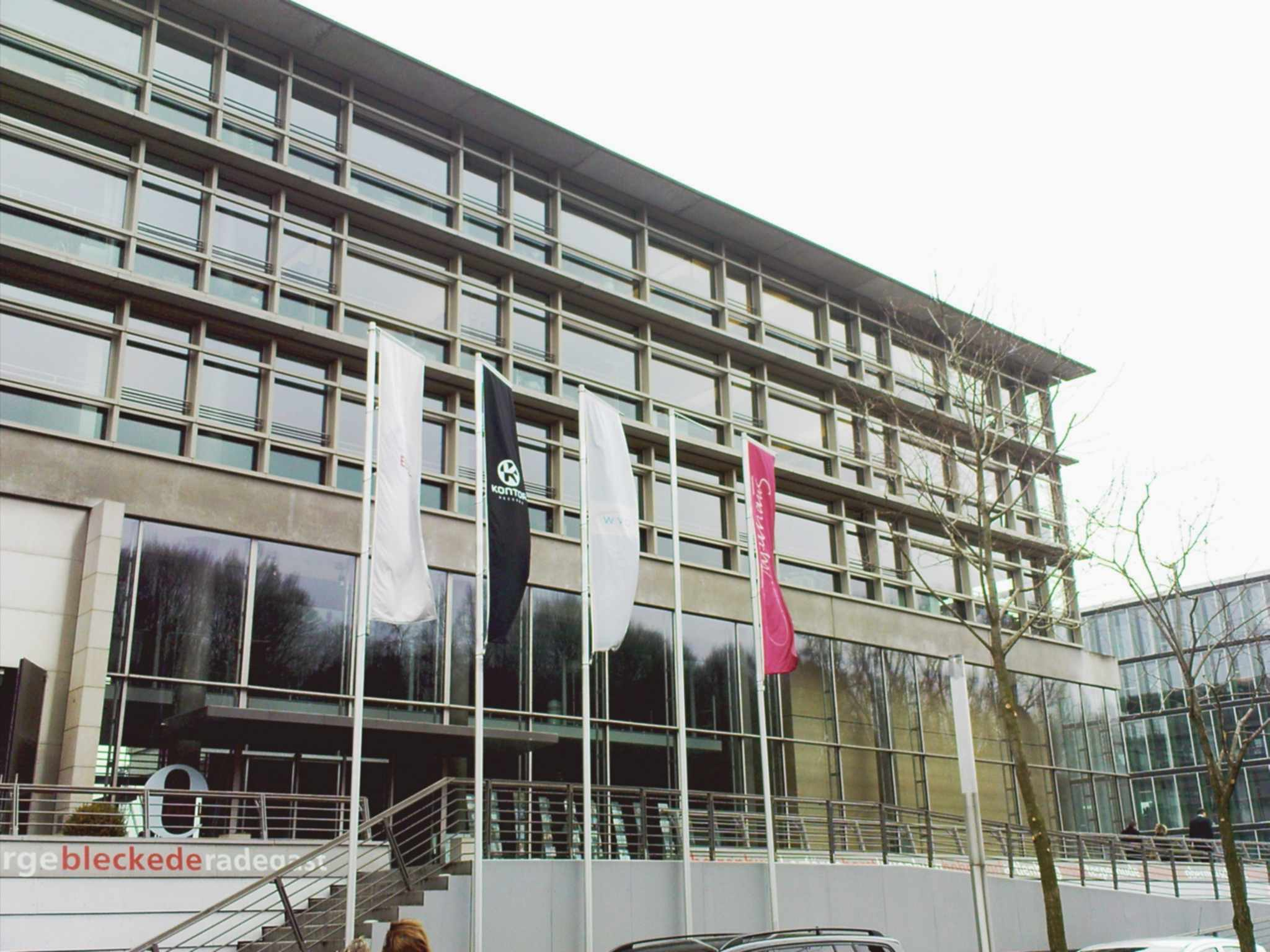 Firmensitz der Edel AG in Hamburg, Eingangsseite